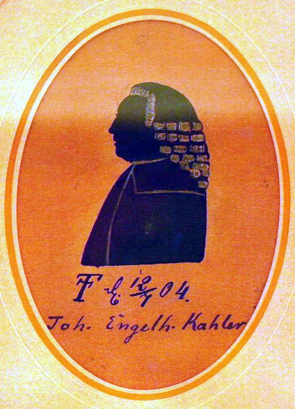 Johann Engelhard Kahler (1729-1804) deutscher lutherischer Theologe